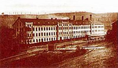 Первое здание мануфактуры «Rudolf Kämpf»